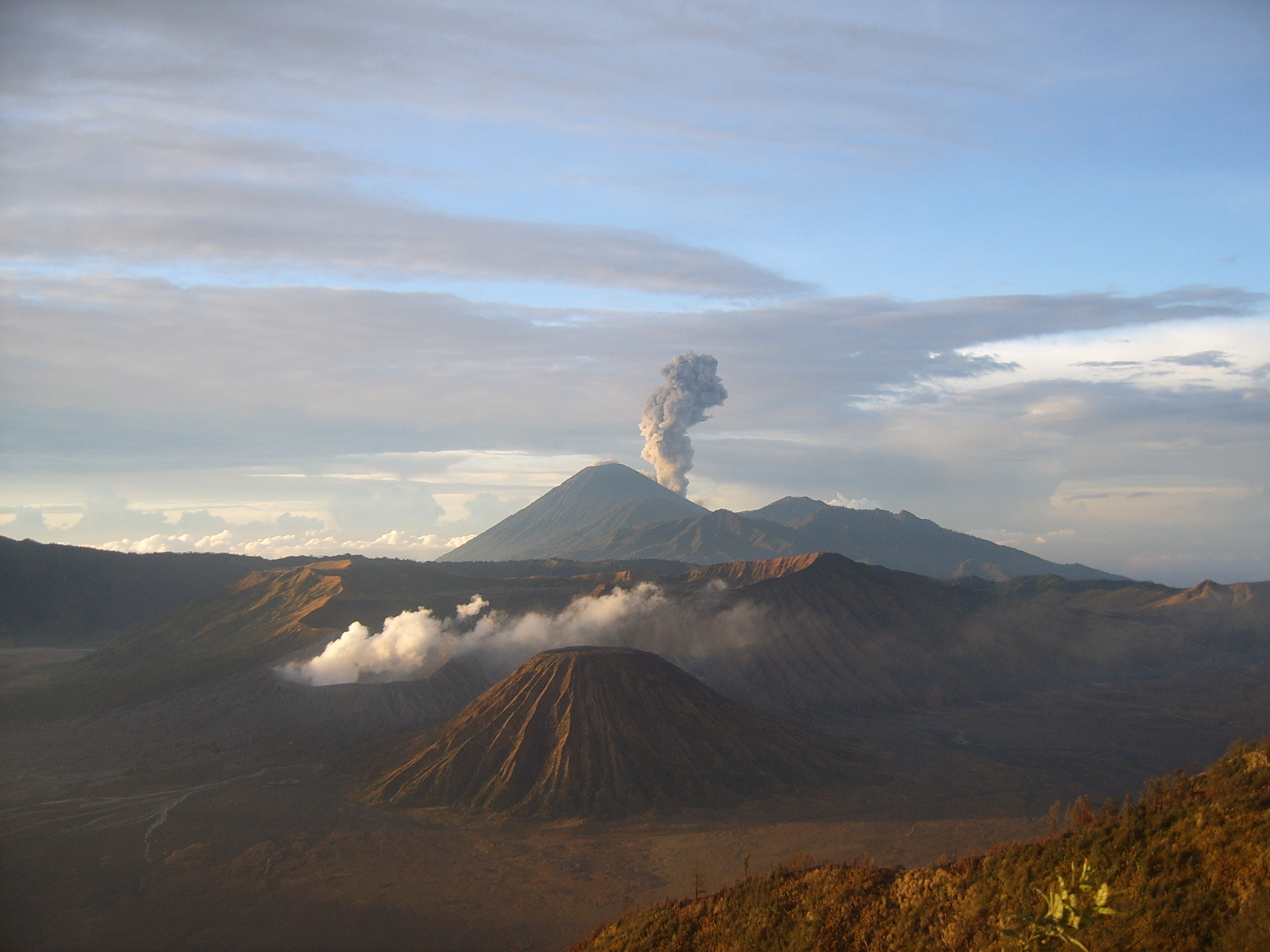 Bromo and Semeru volcanos